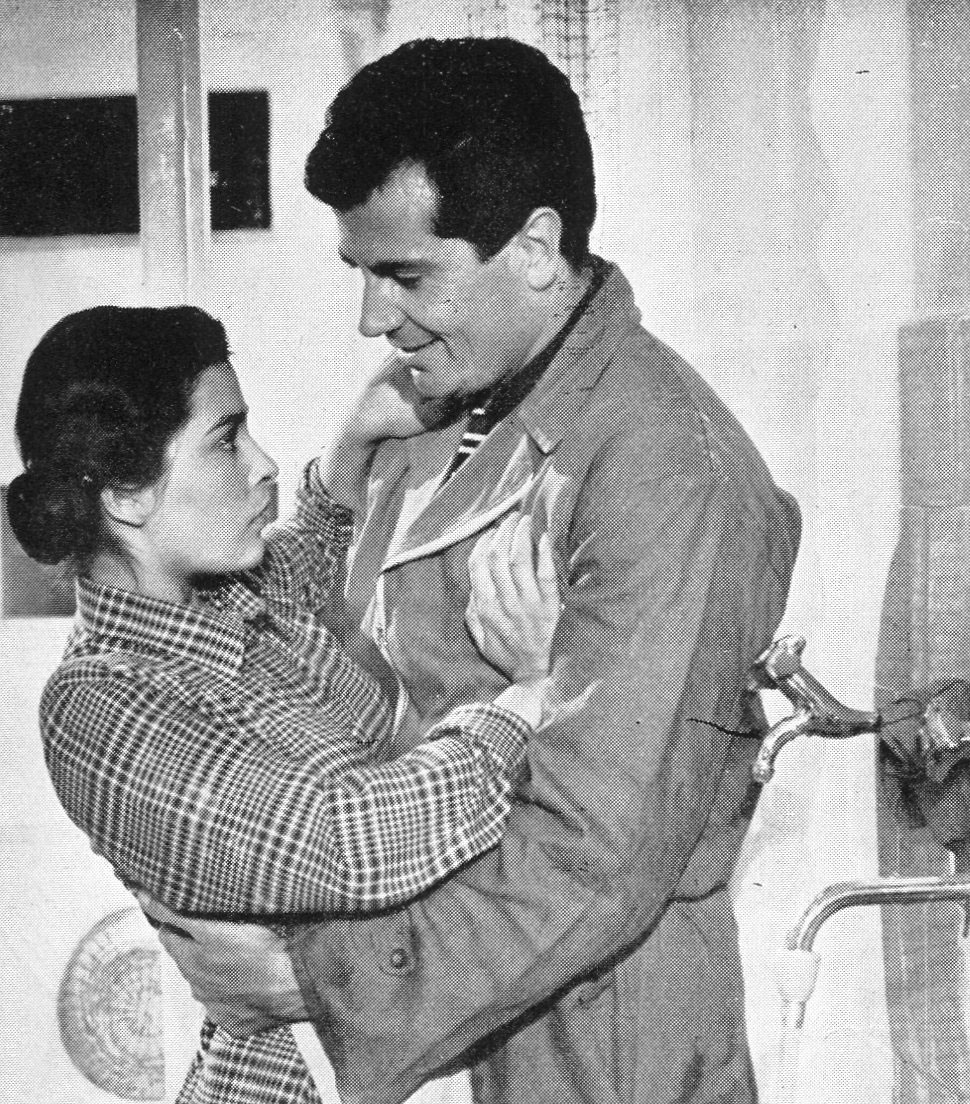 Irene Galter e Gabriele Ferzetti in una scena di "Il sole negli occhi" (Pietrangeli, 1953)